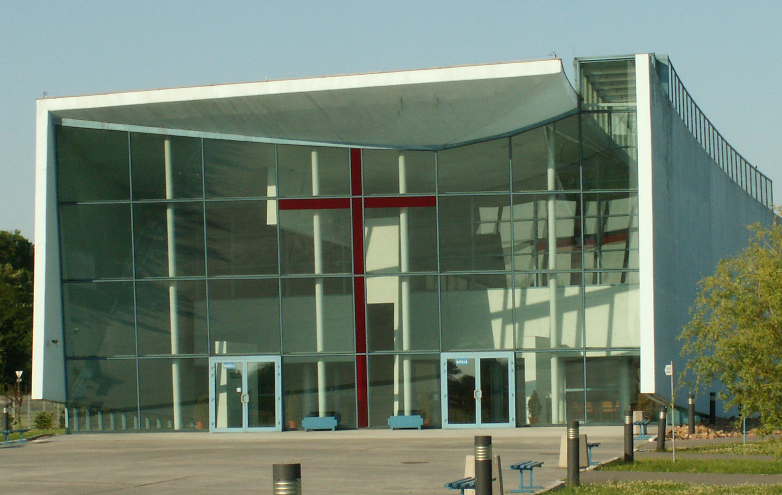 Cmentarz Batowicki w Krakowie; V 2005; autor: macieias